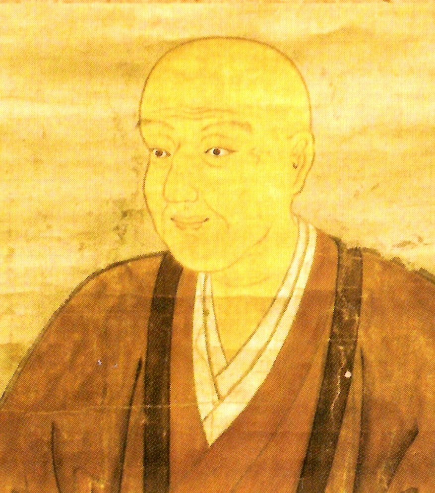 遠山友政の肖像。